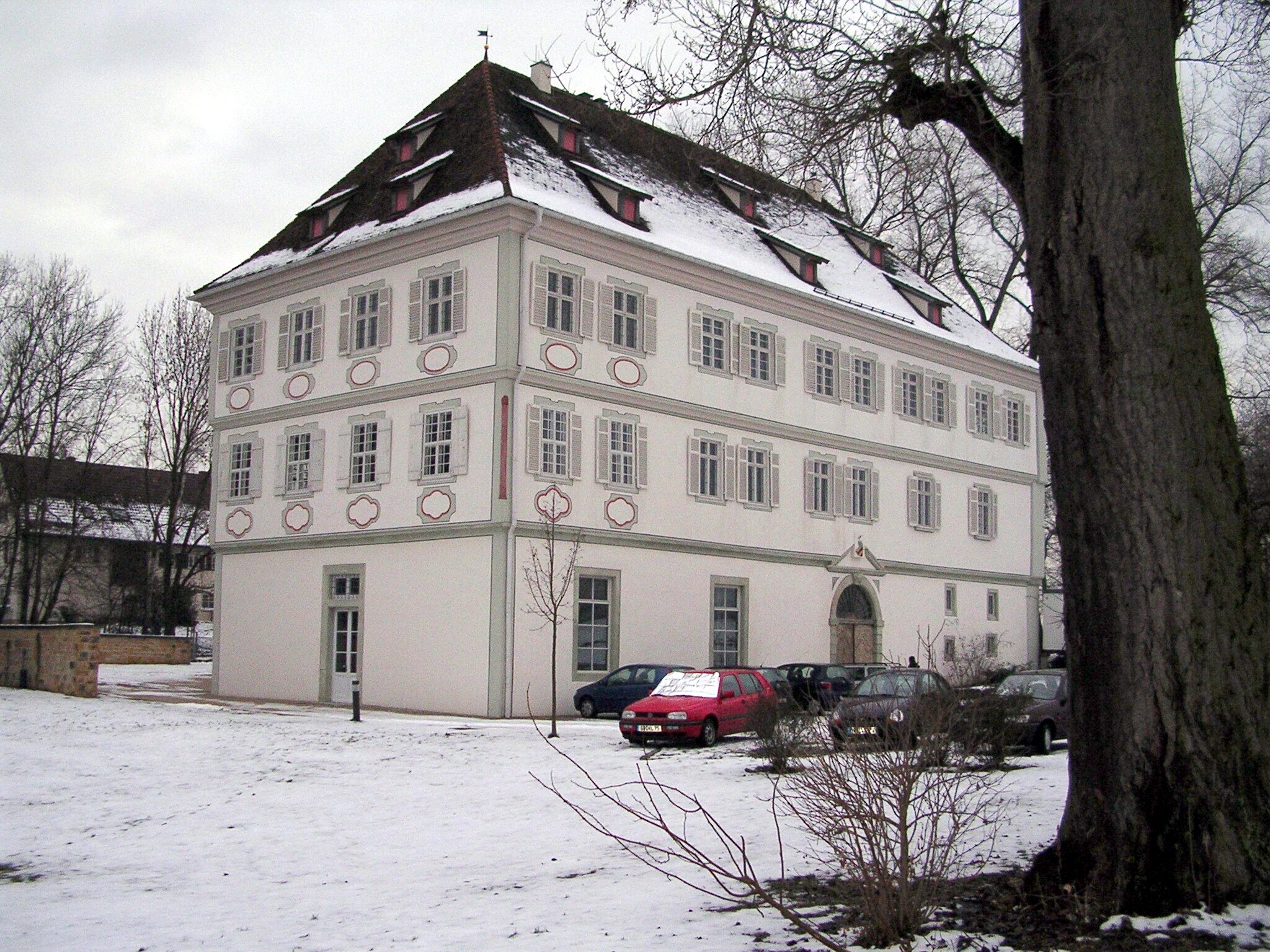 Köngen, castle